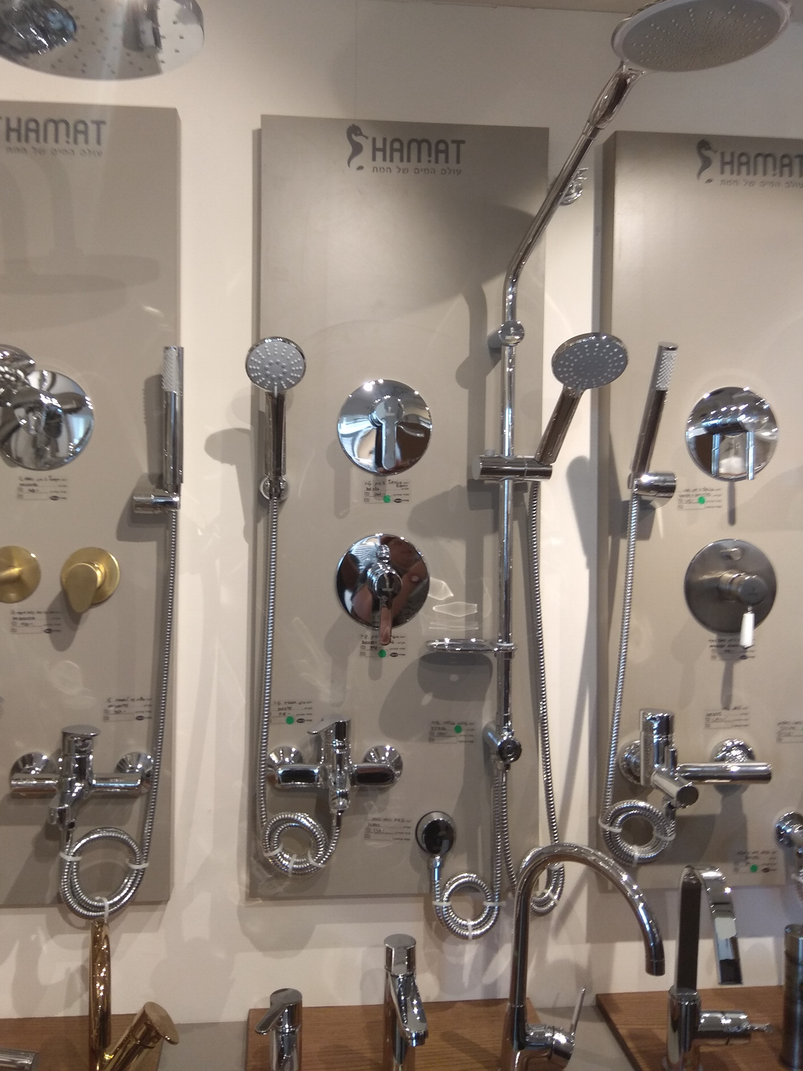 מוצרי חמת באולם תצוגה לאביזרי אבמבטיה